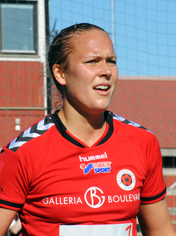 Belgian footballer Lorca van de Putte